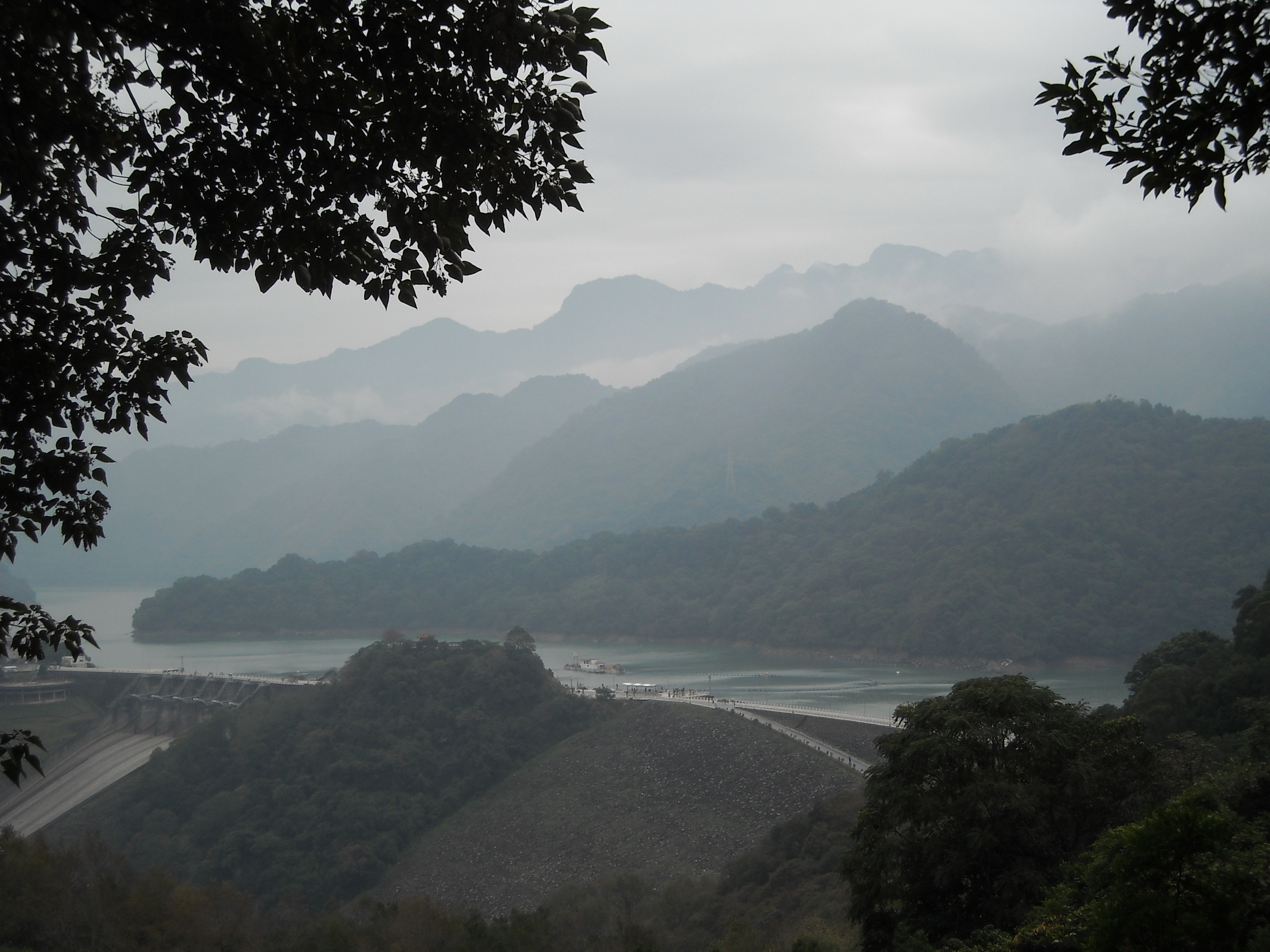 於桃園縣石門山眺望石門水庫